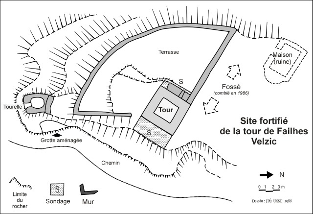 Relevé topographique des structures du site défensif de Falhiès (commune de Velzic)